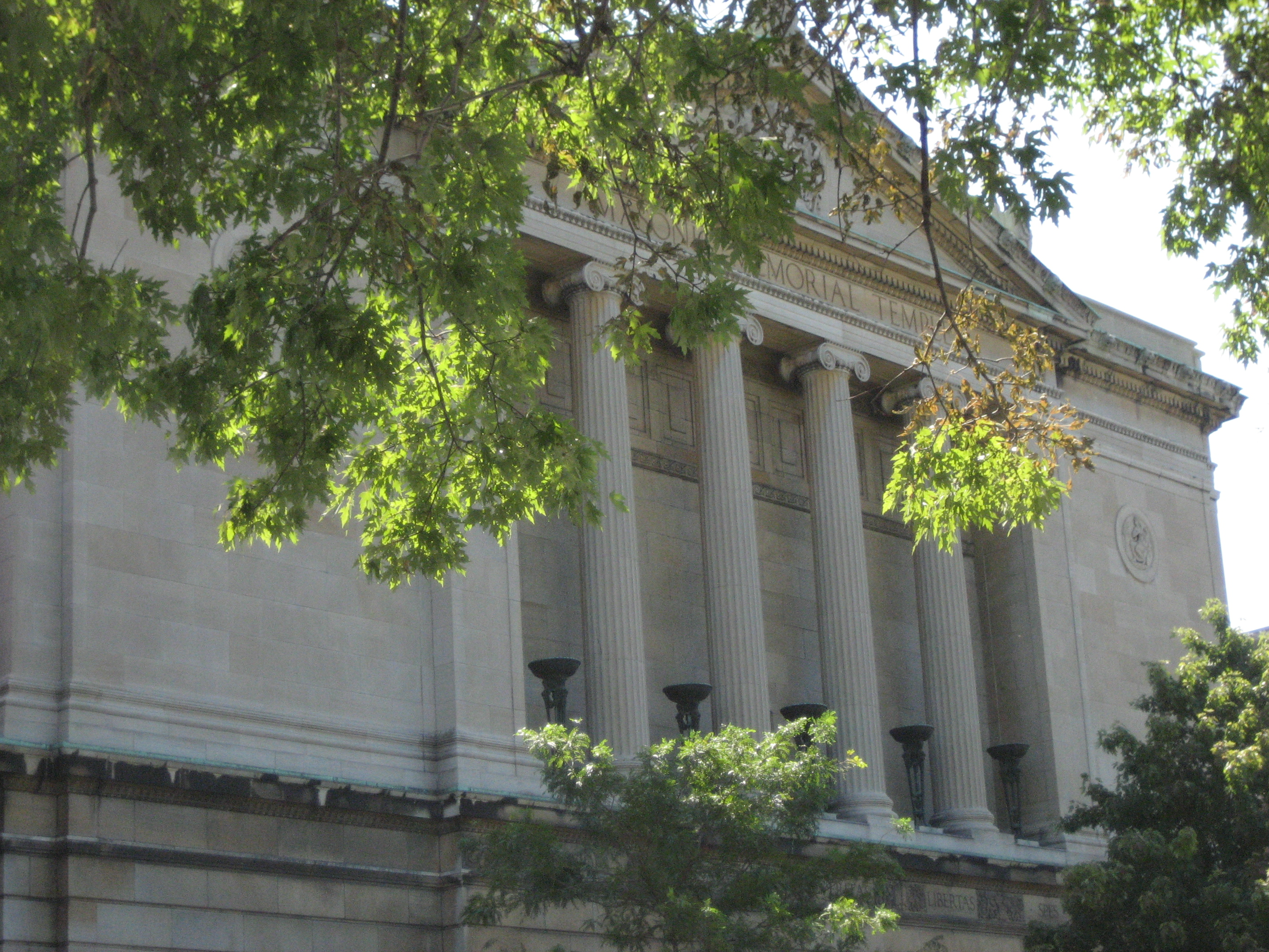 Le temple maconnique de Montréal, rue Sherbrooke et Saint-Marc. Photo prise par Déclic